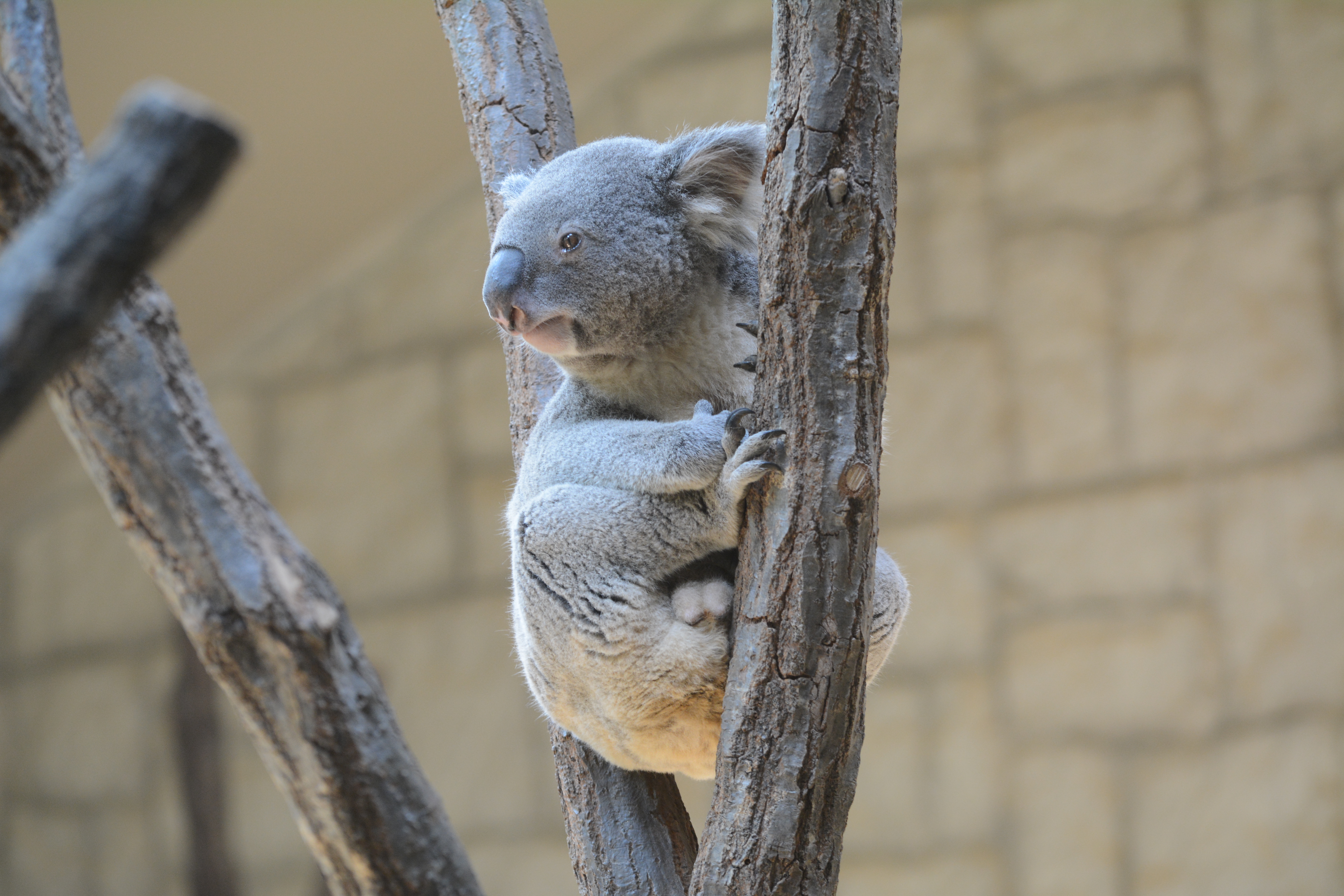 コアラ（東山動植物園）